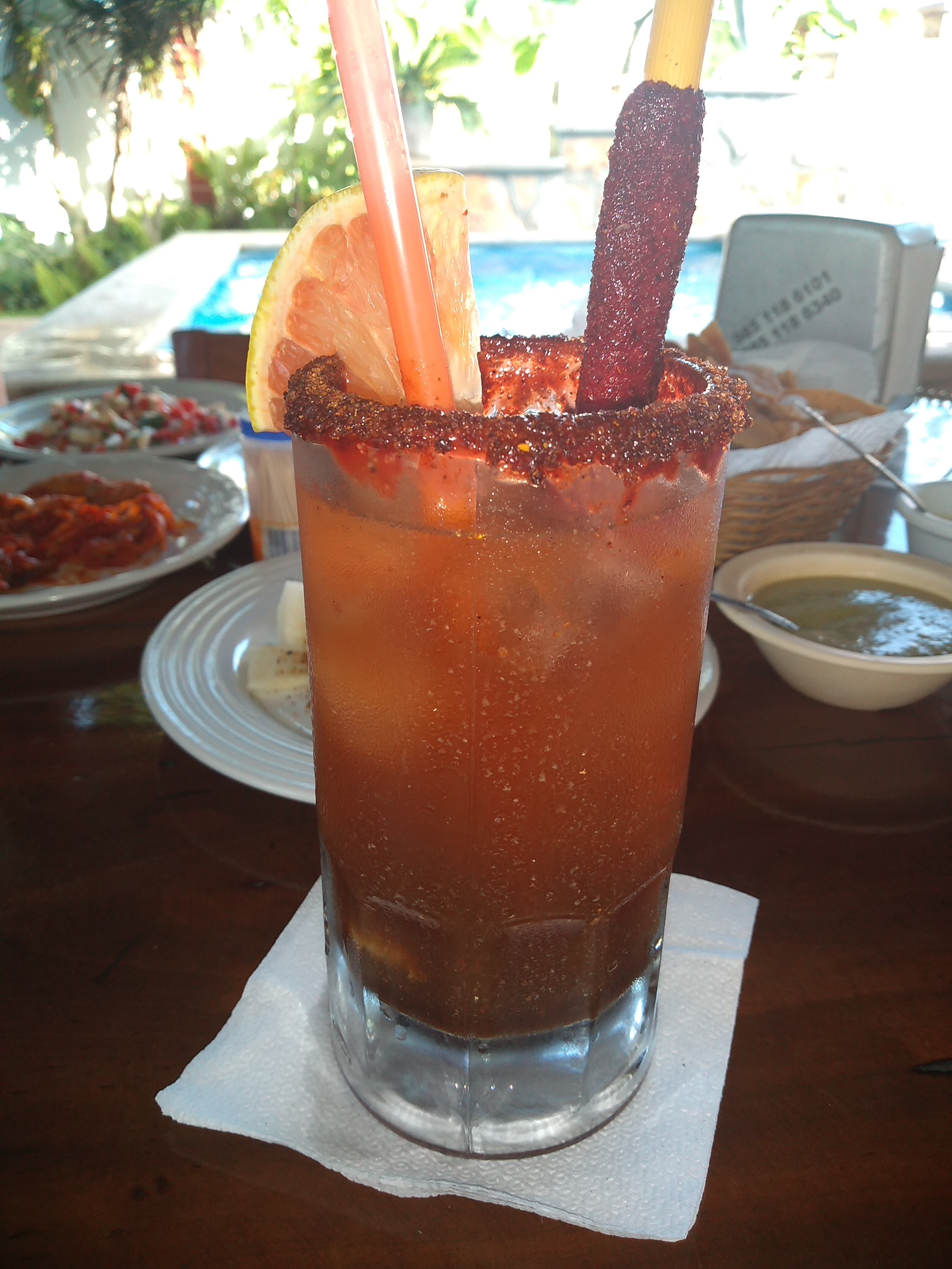 Michelada de Tamarindo de las Cascadas de Valladolid, Yucatán